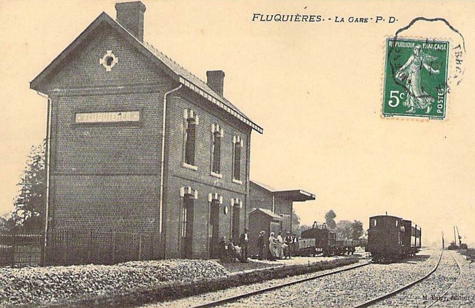 La gare de Fluquières vers 1910.